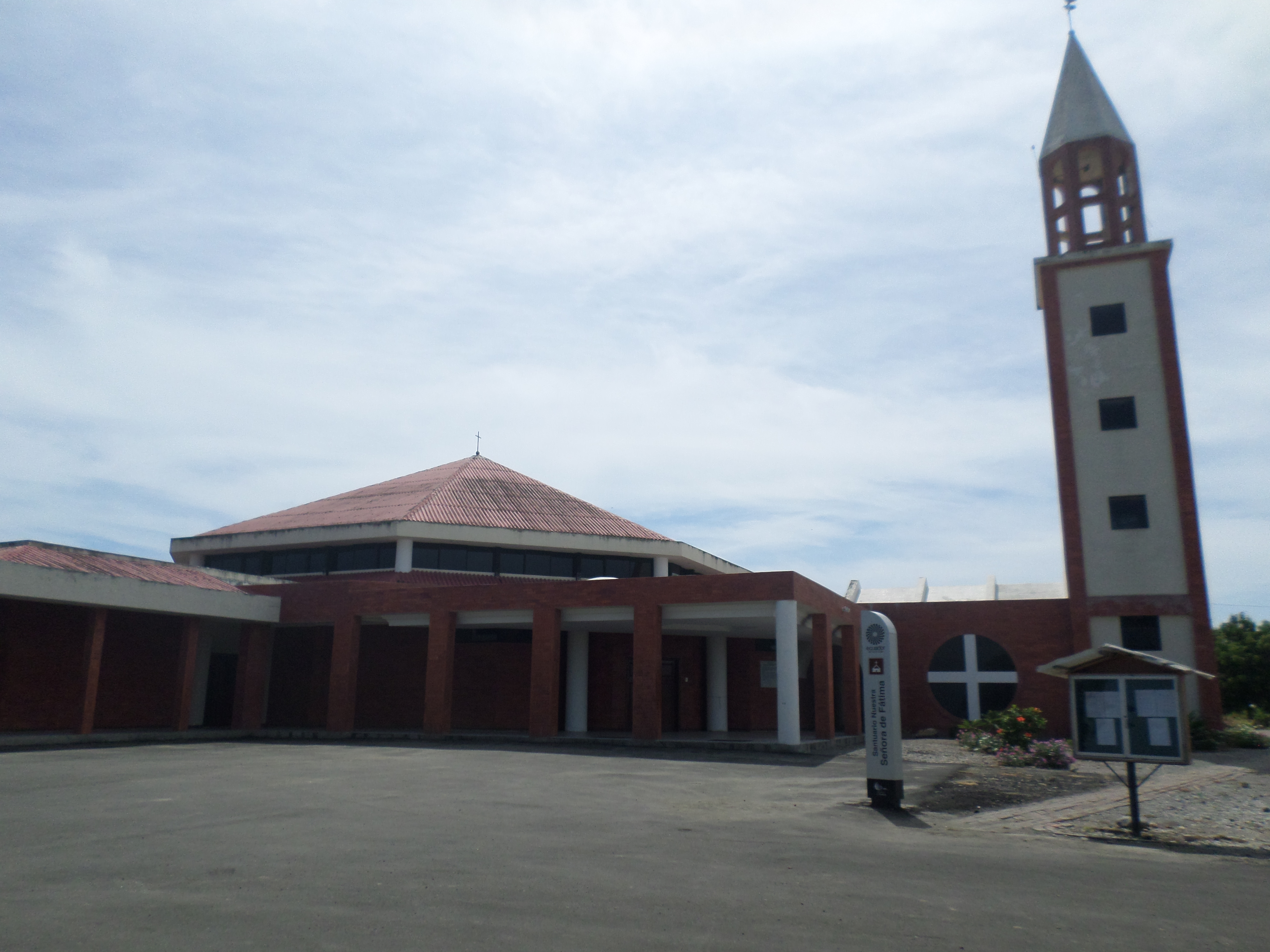 Santuario Nuestra Señora de Fátima